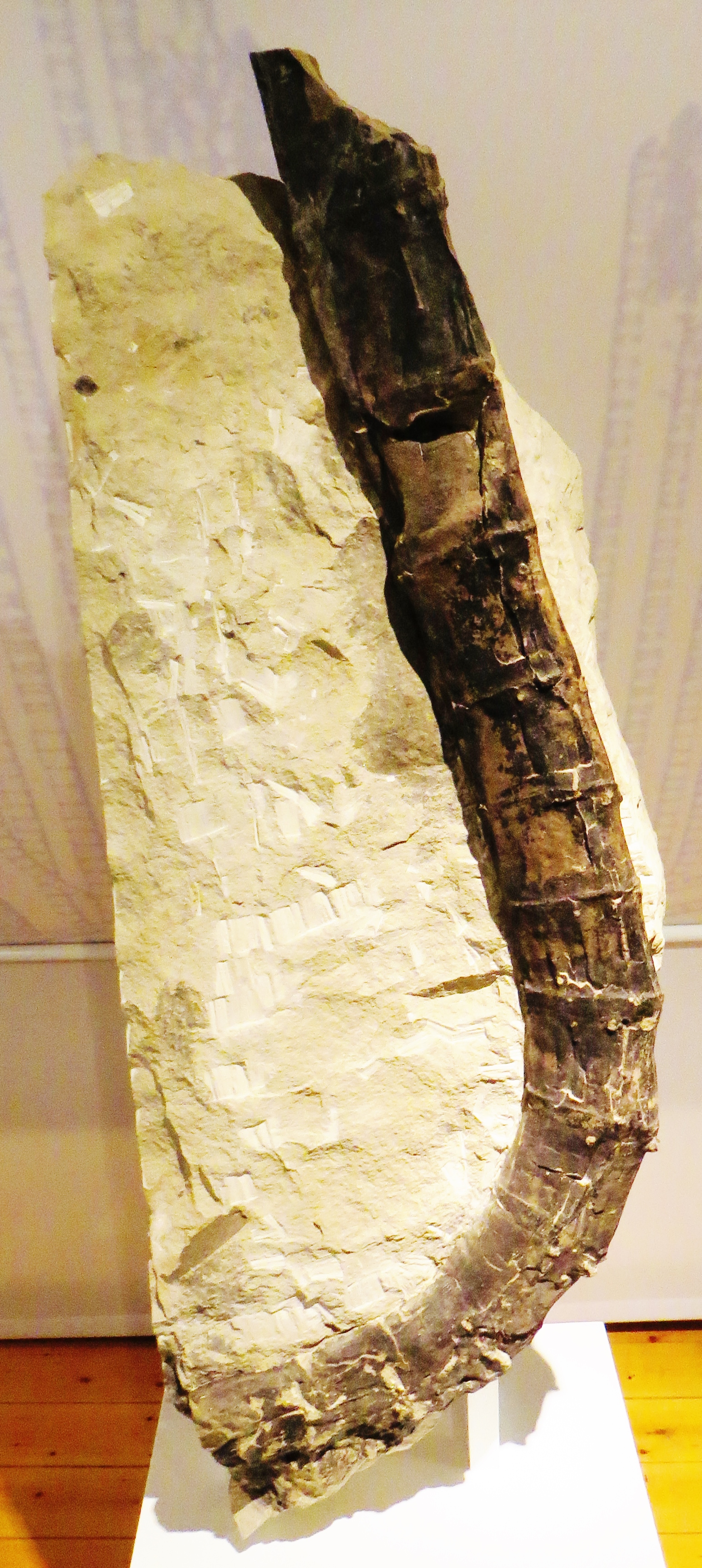 Took the picture at Muschelkalkmuseum Ingelfingen